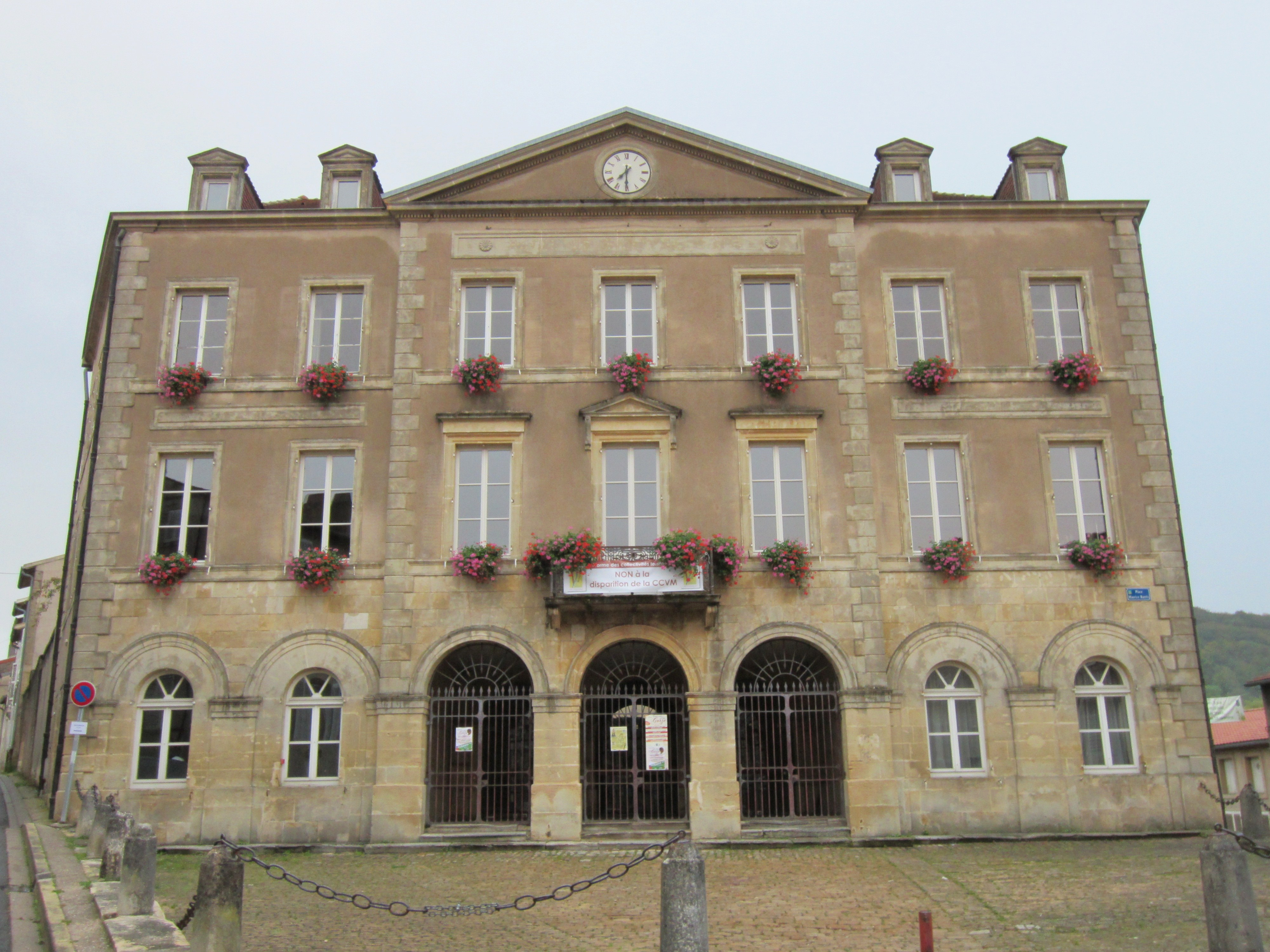 Description ancienne mairie Gorze Date25 September 2011Sourcemon appareil photoAuthorAimelaimePermission(Reusing this file) ancienne mairie Gorze